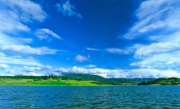 LAGUNA DE FUQUENE